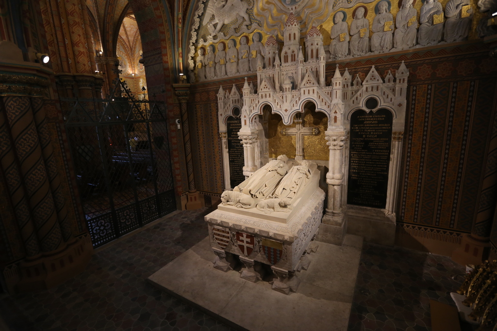 III. Béla sírja a Mátyás-templomban